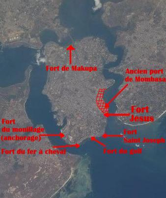 Vue satellite de Mombasa prise par l'ISS montrant l'emplacement des anciennes fortifications portugaises.